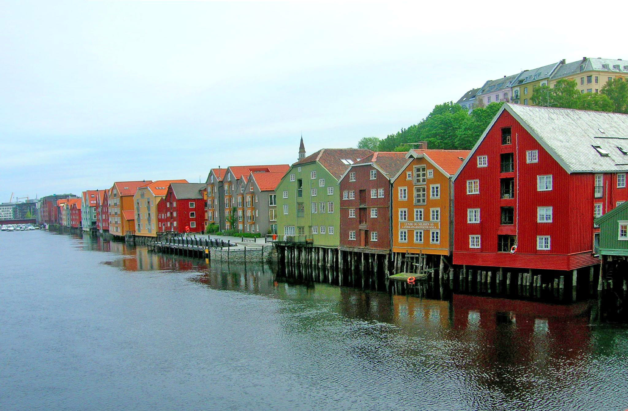 Trondheimer_Stelzenhaiser.